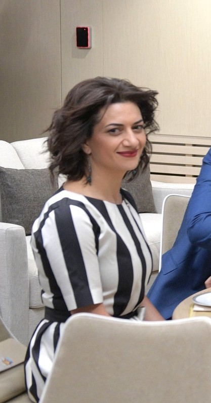 В перерыве матча Президент России Владимир Путин кратко пообщался с иностранными гостями, прибывшими на Чемпионат мира по футболу 2018 года